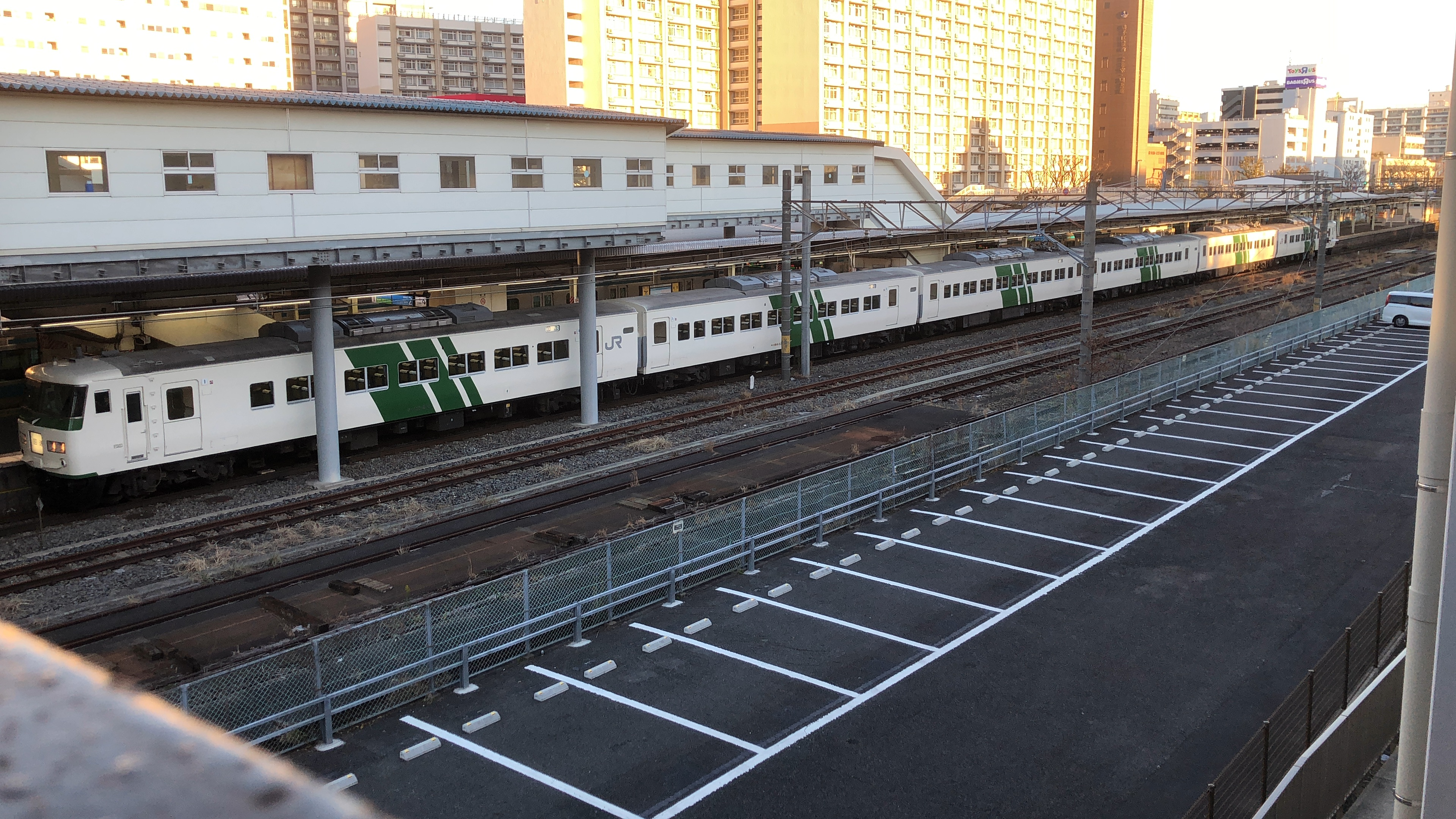 JR磯子駅に回送されるはまかいじ号